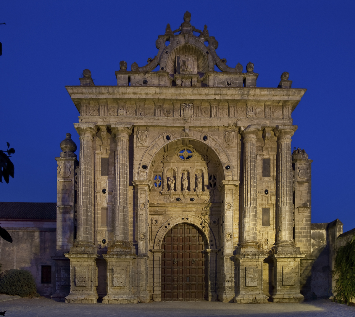 Vista nocturna de la fachada de la Cartuja de Jerez